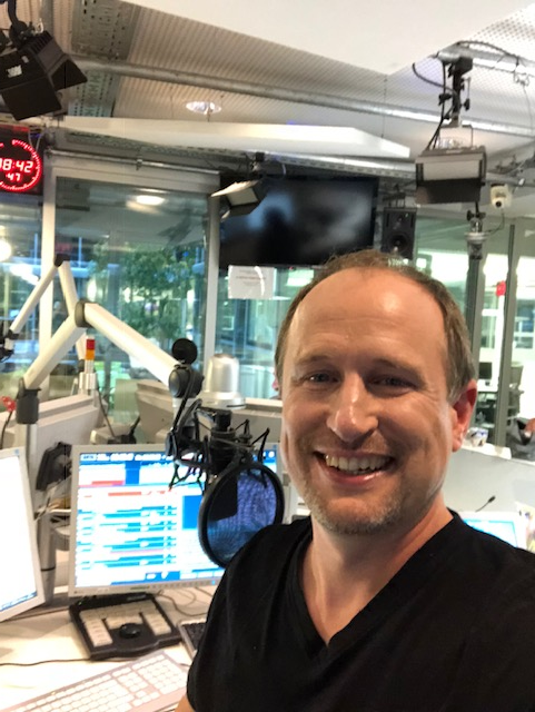 Olli Briesch während der Moderation der Frühsendung im 1LIVE-Haus in Köln 2018